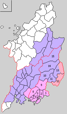 山口県佐波郡の町村制時点の町村。